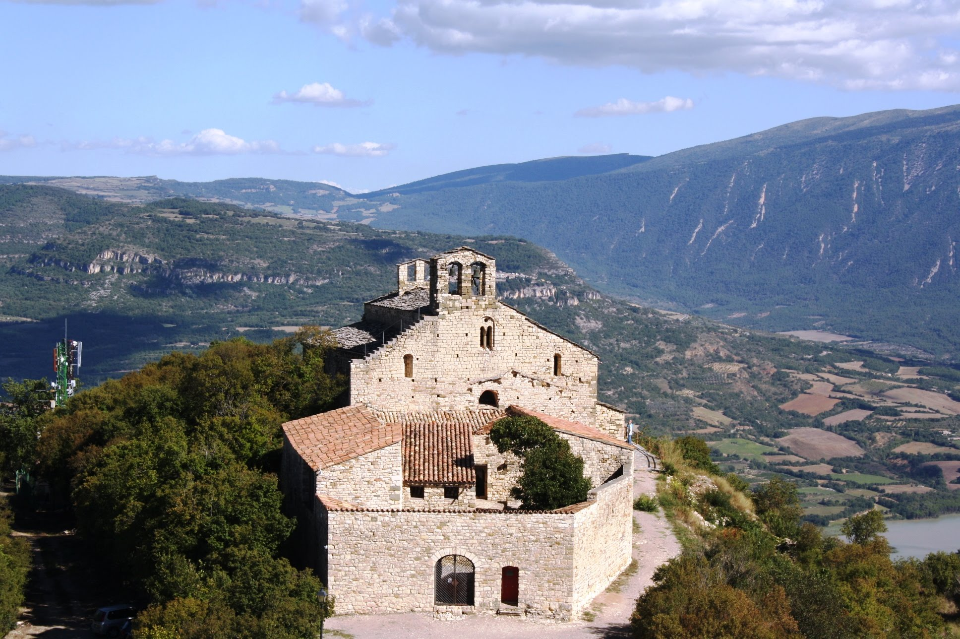 Vista de Santa Maria de Mur des del Castell de Mur